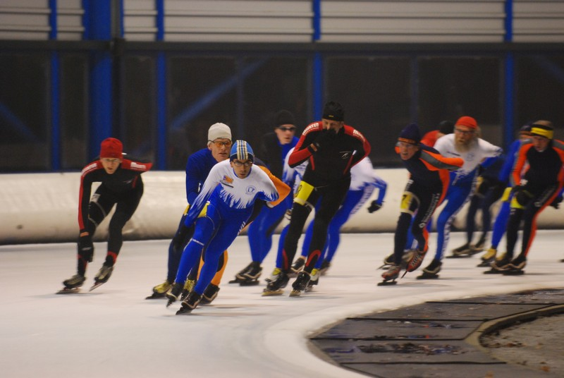 Marathonschaatsen